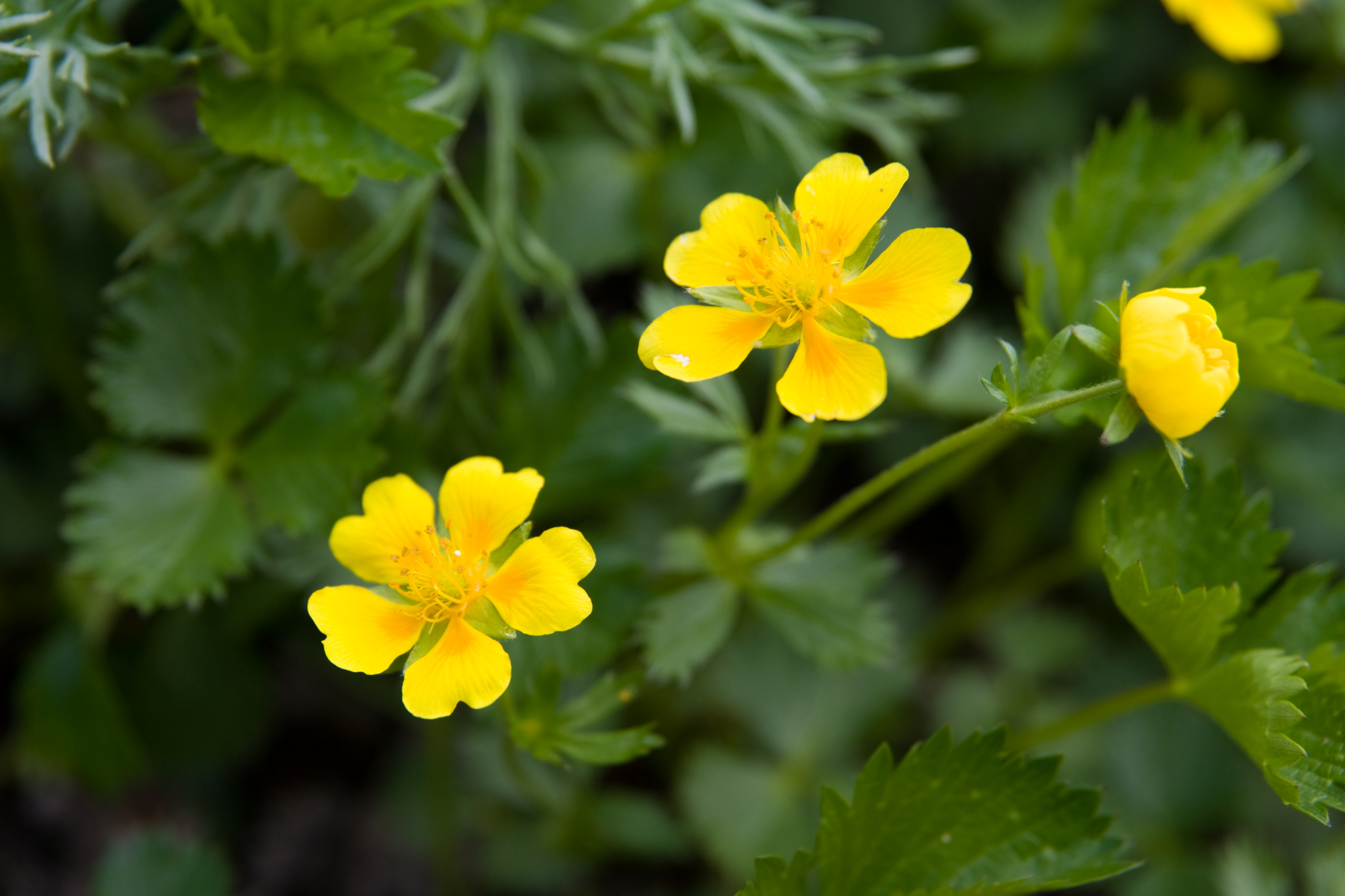 ミヤマキンバイ (学名:Potentilla matsumurae)